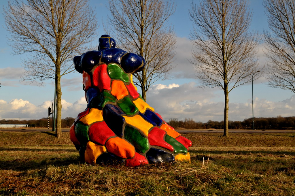 Provinciale Weg N285, bij de aansluiting met Terheijden/The Netherlands. Kunstenaars Geer Pouls (1954 Rotterdam) en Rob Brandt (1946 Gorssel). Eén kan, één vaas en één pot + poort, symboliserend de oude, de huidige en de toekomstige tijd. Onthuld door Rein Welschen, gedeputeerde provincie Noord-Brabant.